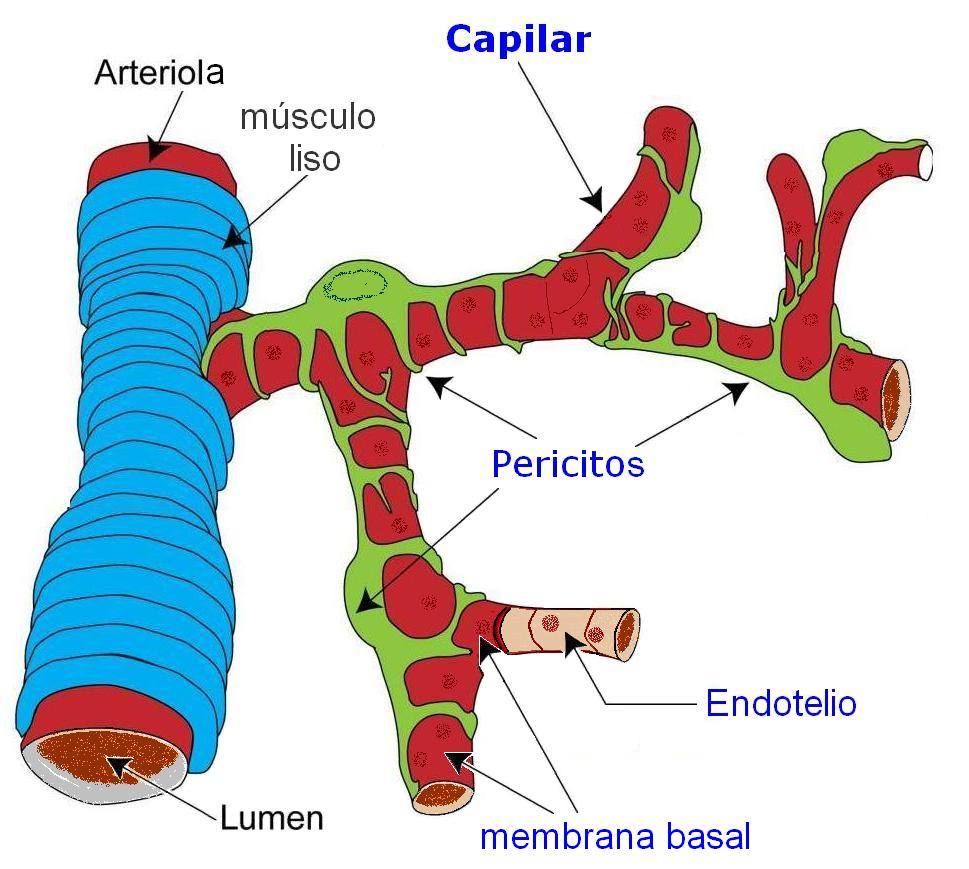 Fig. 1.A Microvasculatura. Arteriola izquierda. Plexo capilar derecha (naranja). Endotelio. Lámina basal (en rojo). Pericitos (en verde)